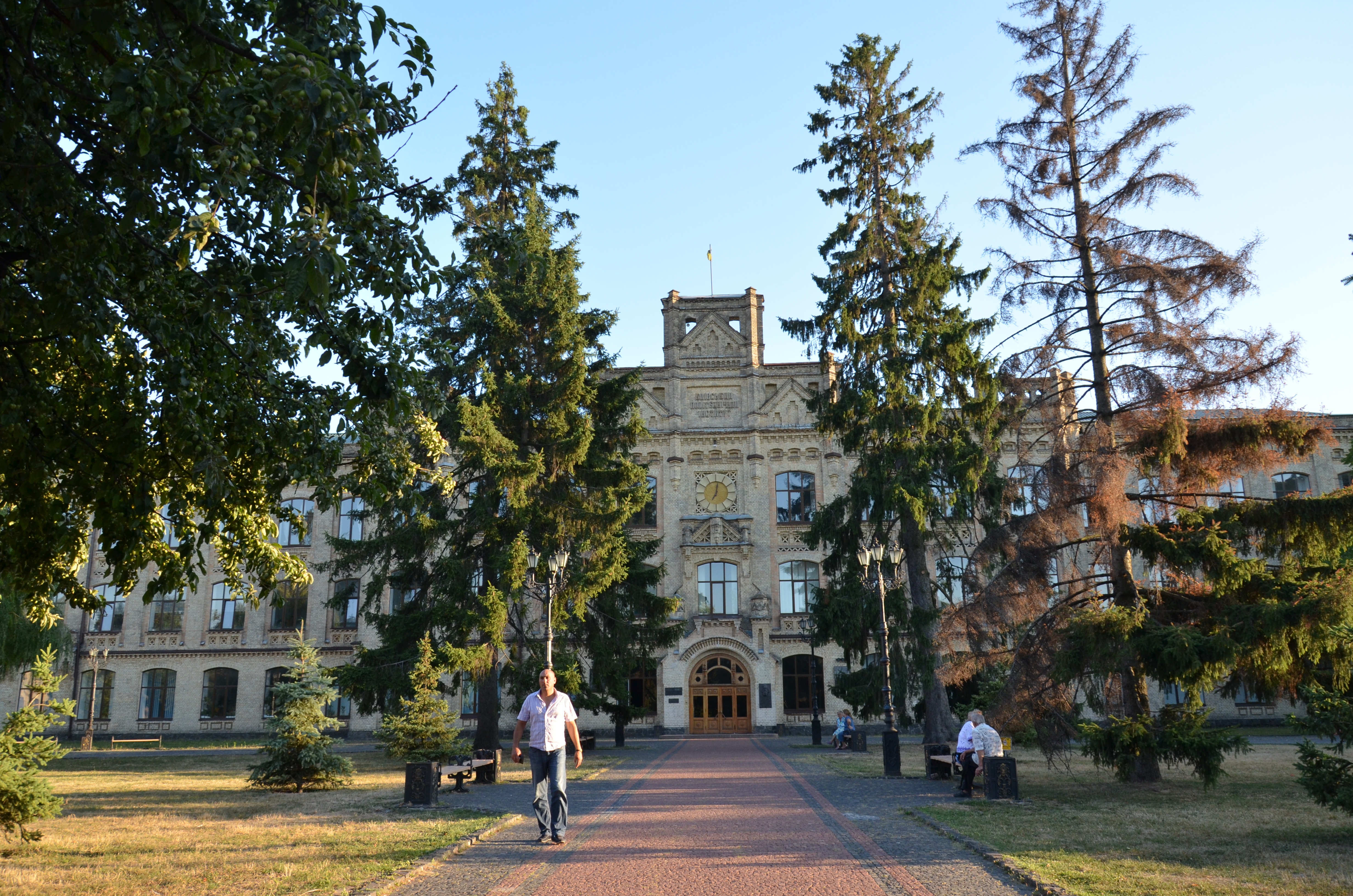 Комплекс споруд Київського політехнічного інституту